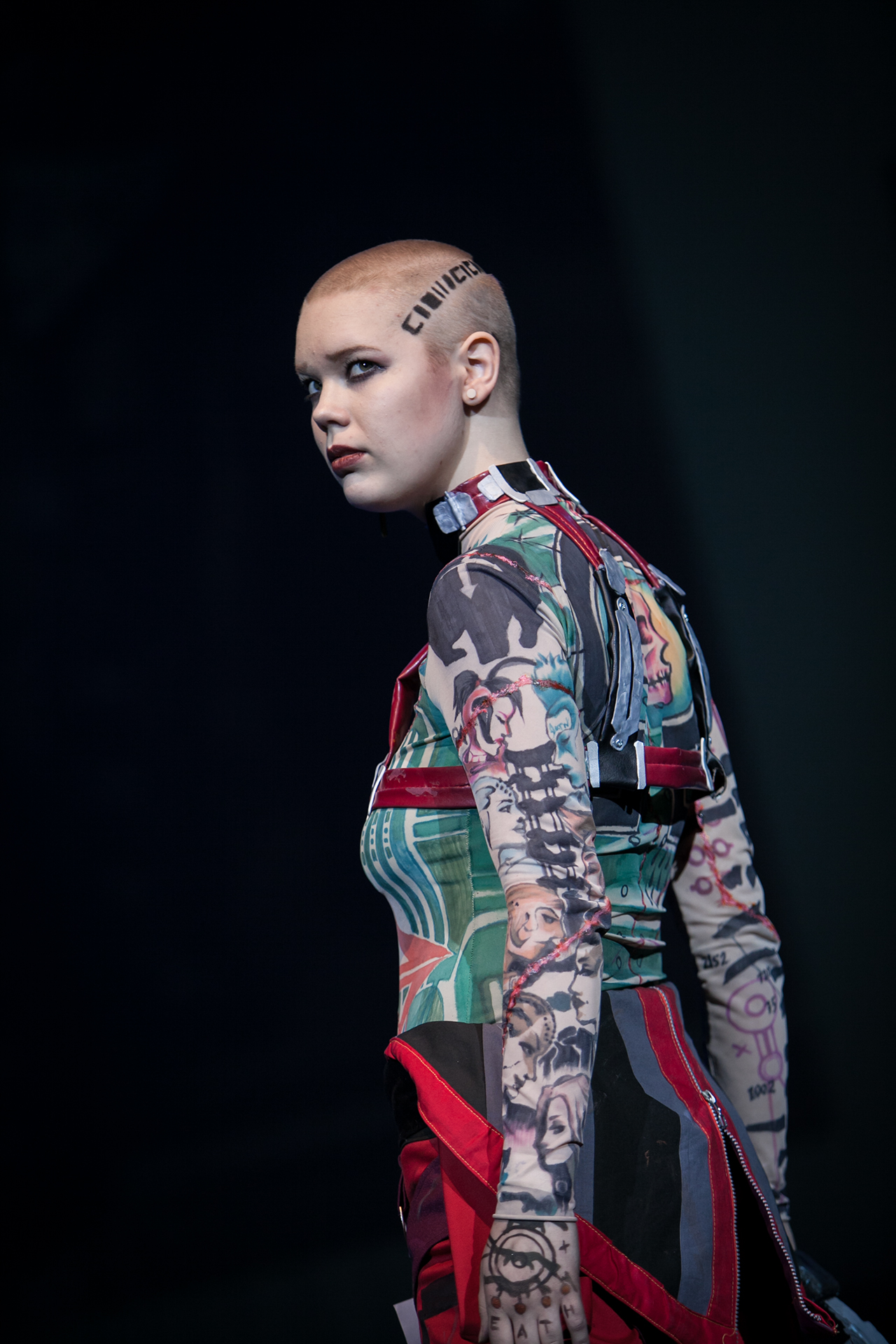 20140118172820IMG_5475